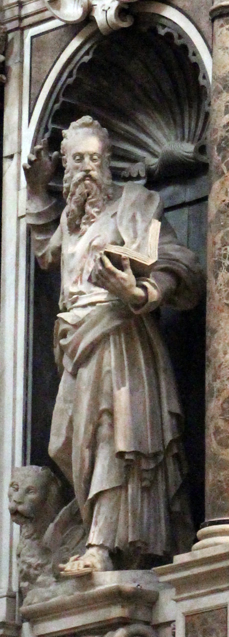 San Lorenzo (Genova)